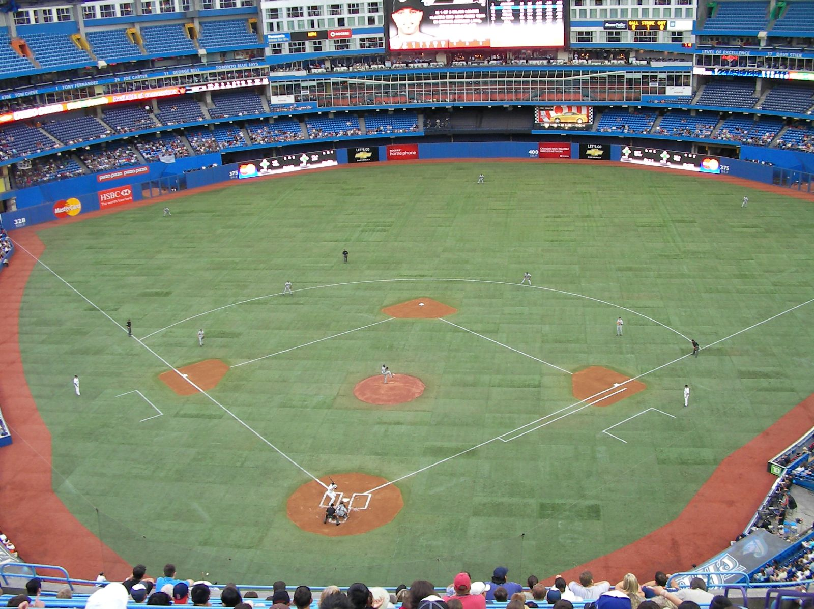 Rogers Centre